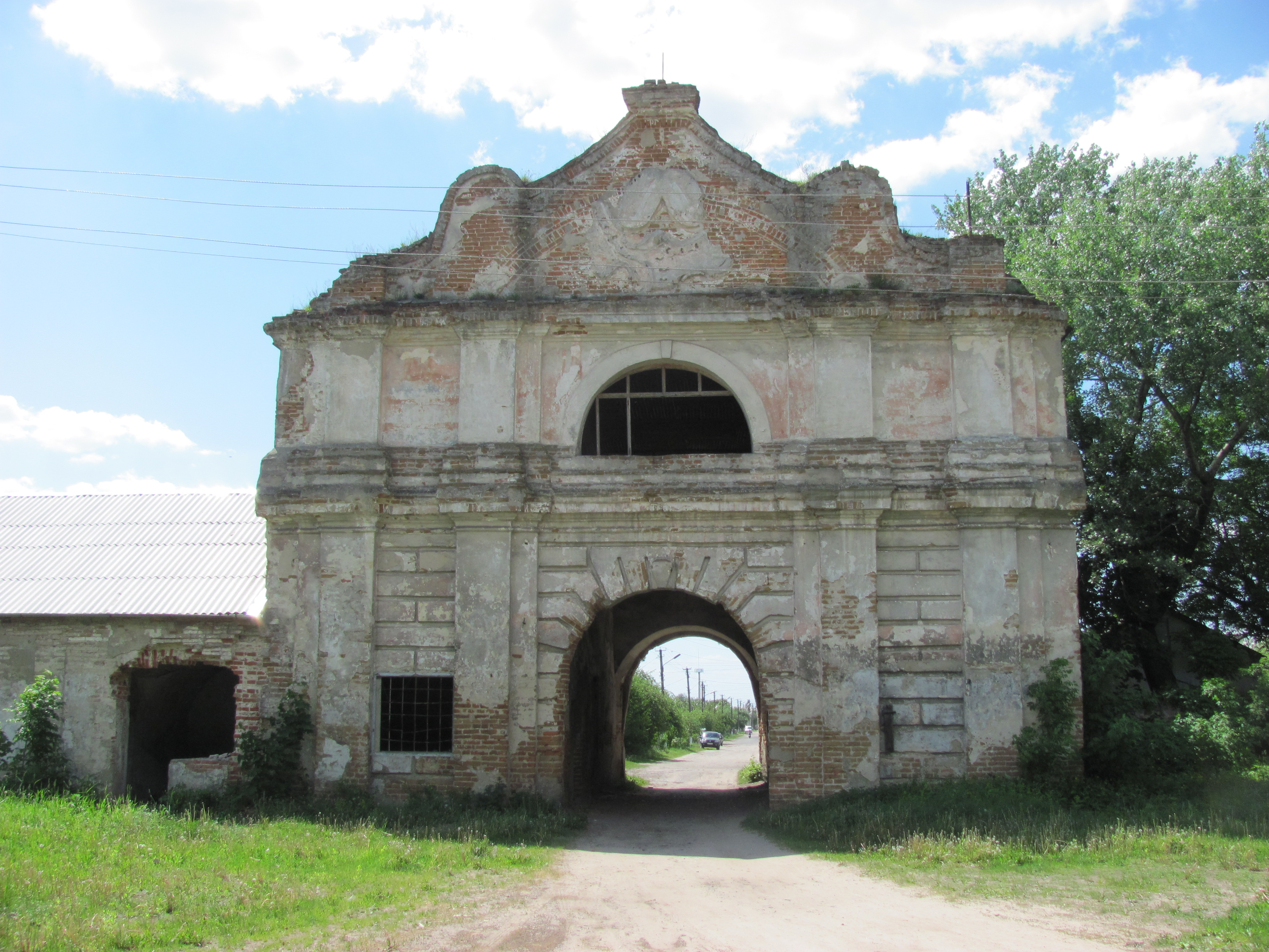 Вигляд з боку садиби.